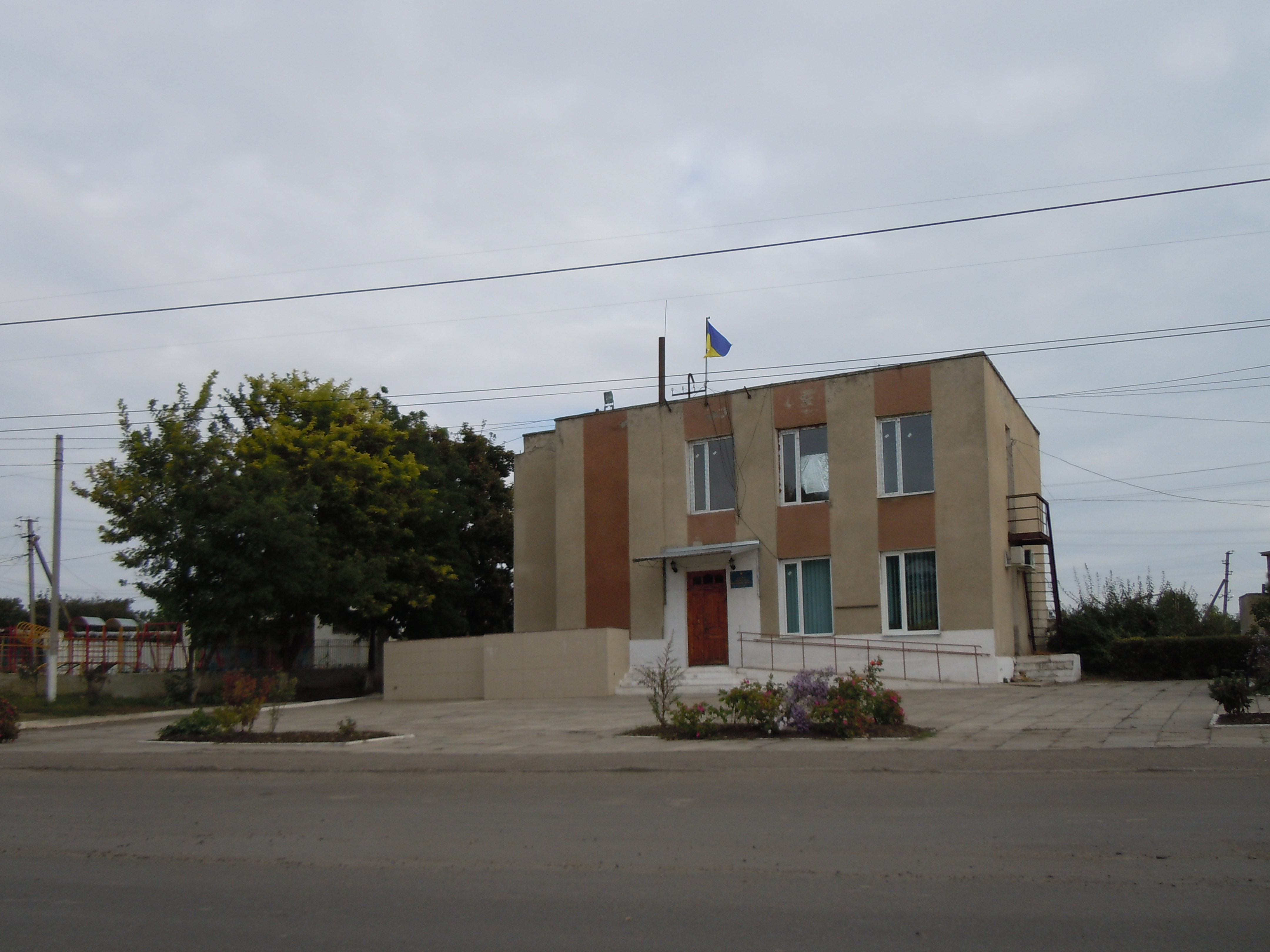 Сільська рада села Броска, Ізмаїльський район, Одеська область